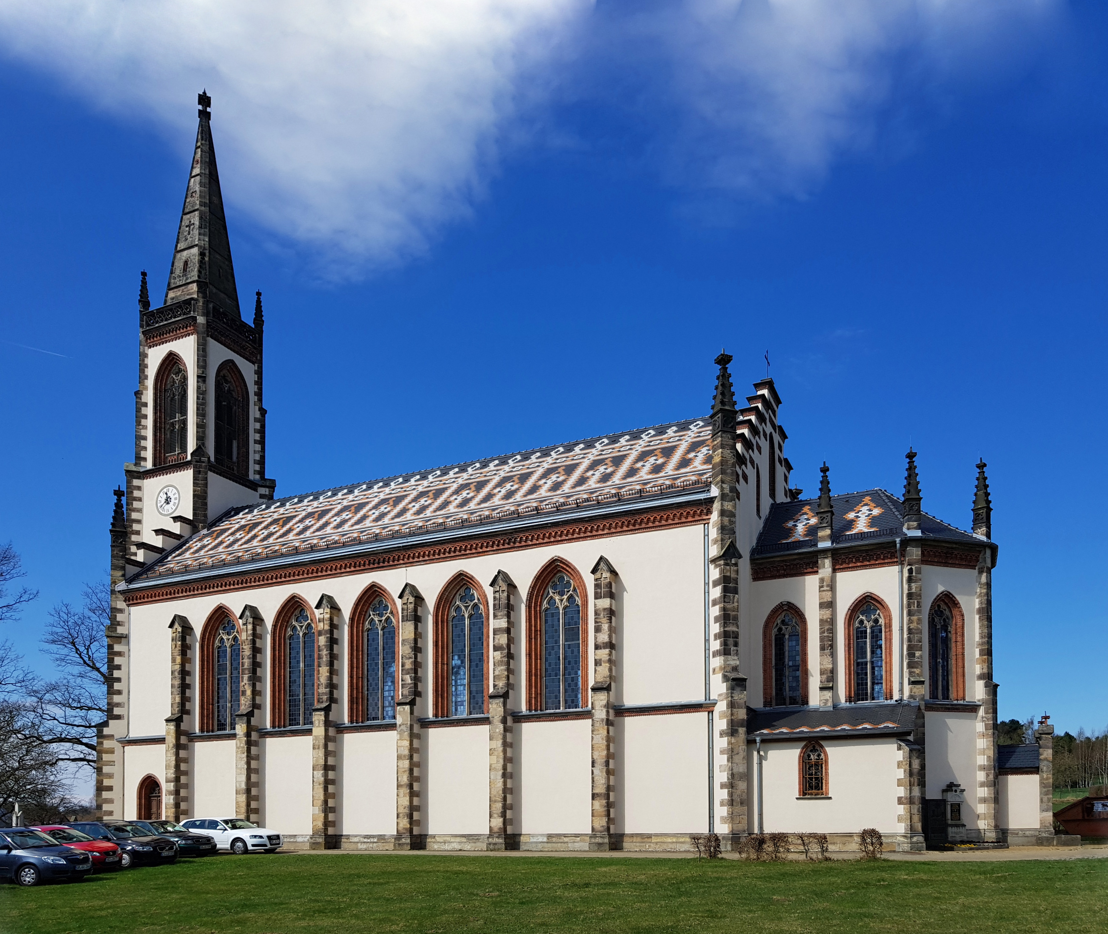 Pfarrkirche Mariä Himmelfahrt April 2018 (1)